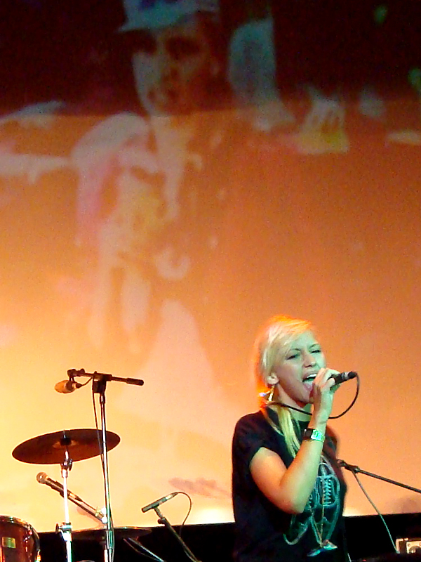 Lo mejor de la fiesta MTV junto con las cervezas gratis